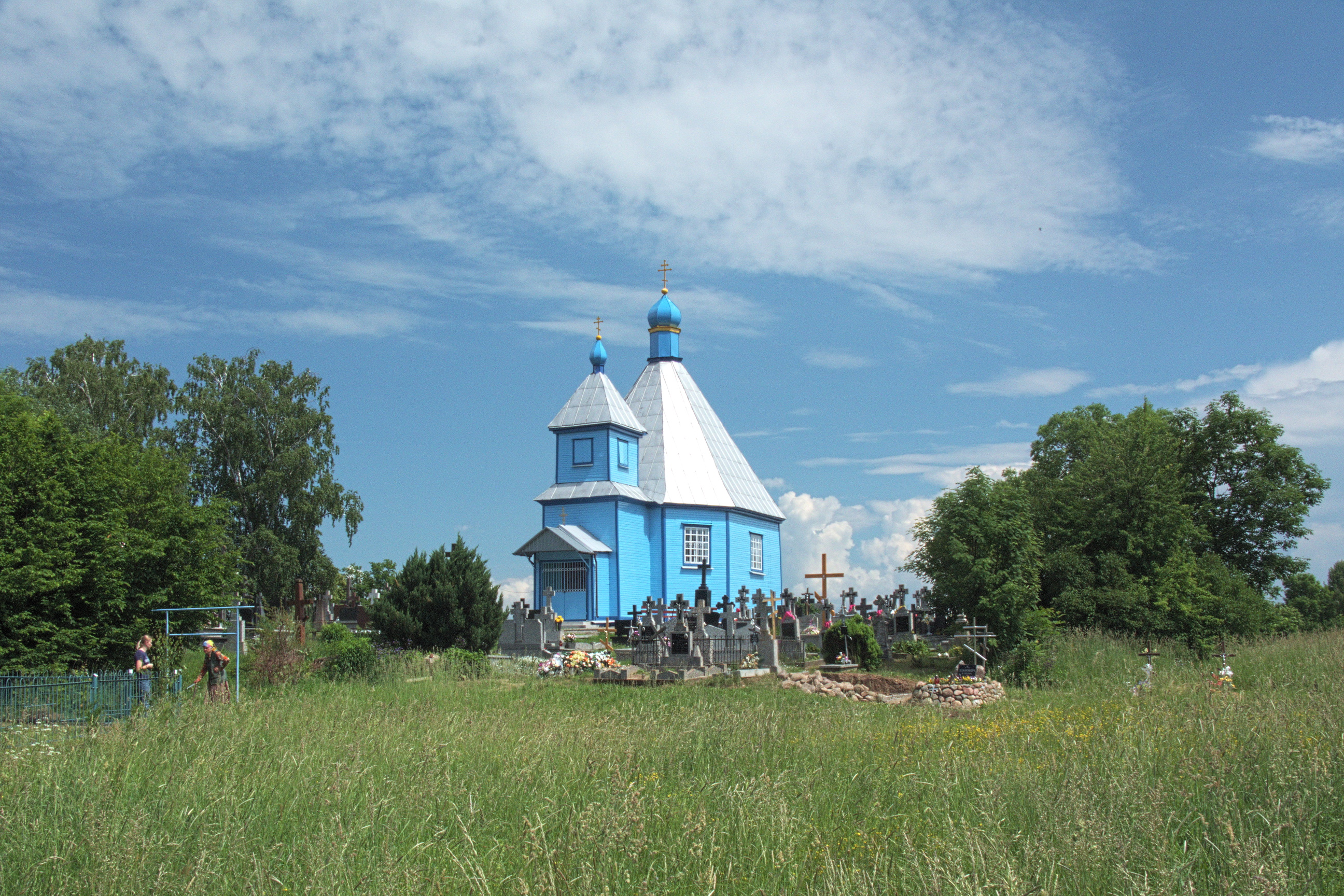 Cerkiew cmentarna pod wezwaniem św. Dymitra Sołuńskiego w Parcewie.